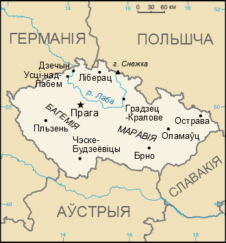 Карта Чэхіі